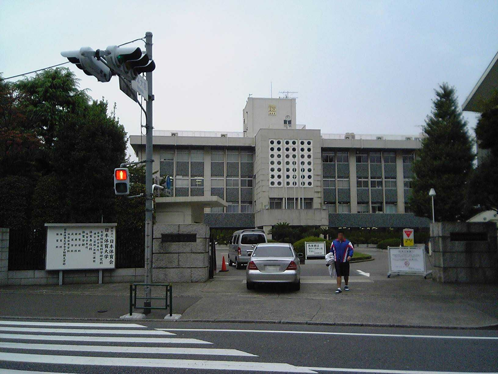 日本体育大学（2005年10月15日投稿者が撮影） Category:大学の画像 Category:世田谷区の画像